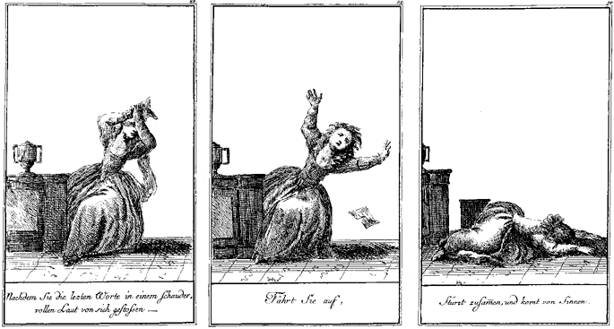 Illustration zum Melodram "Lenardo und Blandine", Kupferstich Faksimile der Erstausgabe